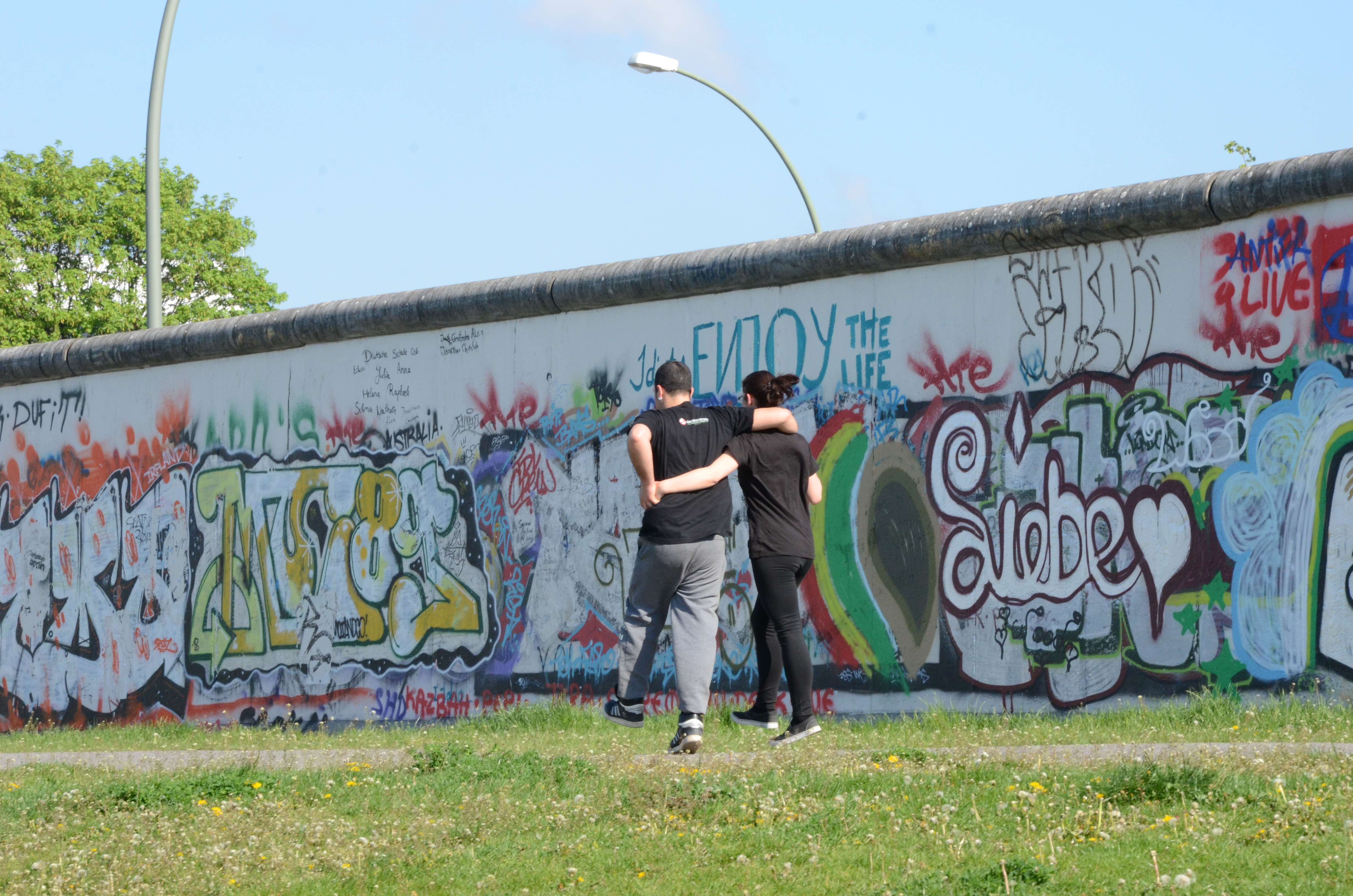 Muro di Berlino